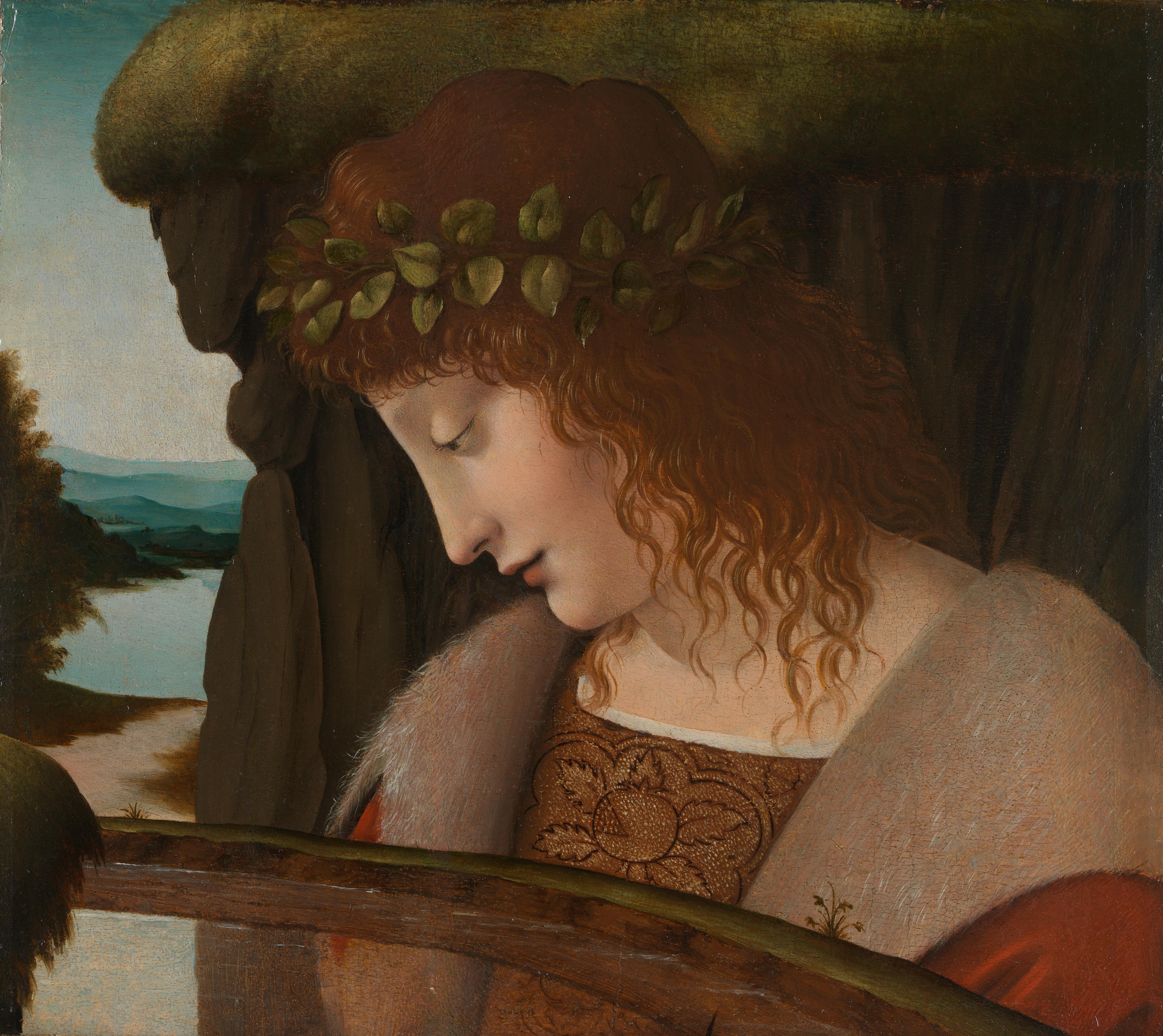 Narcissus